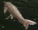 Kleine afbeelding van een door khv besmetting volledig rood doorlopen platinum ogon